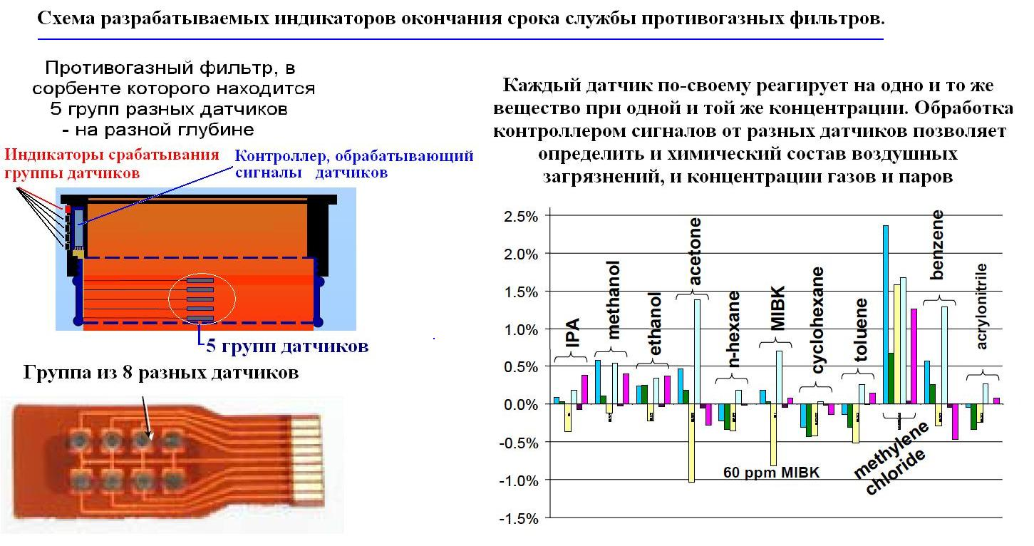 Изображение сделано на основе указанного документа, который является общественным достоянием. Собранные изображения показывают, как работает перспективный активный индикатор окончания срока службы противогазных фильтров (ESLI), распознающий химический состав газообразных воздушных загрязнений и концентрации газов и паров путём обработки сигналов разных датчиков с помощью контроллера.